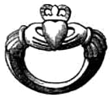 Claddagh ring